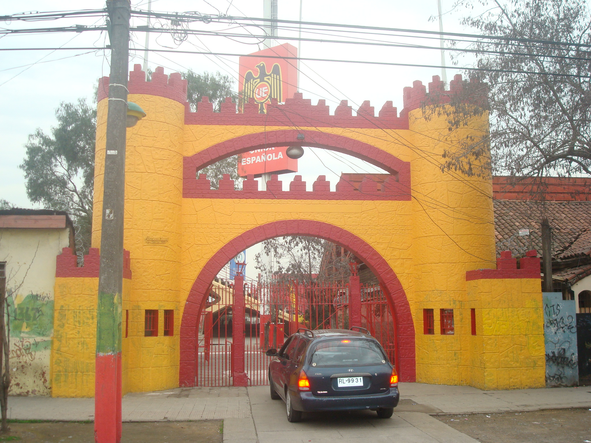 Entrada al Estadio Santa Laura, Independencia, Santiago de Chile